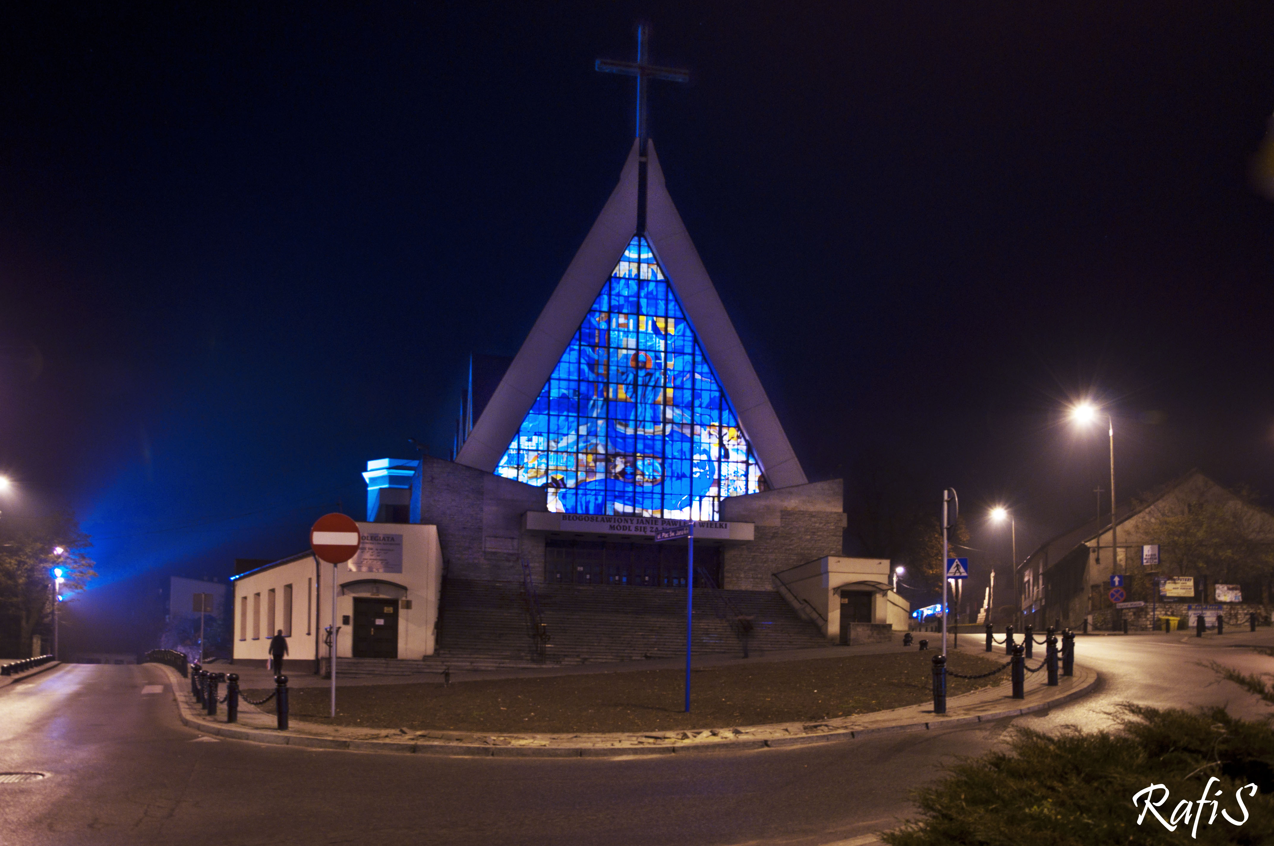 Kościół św. Wojciecha